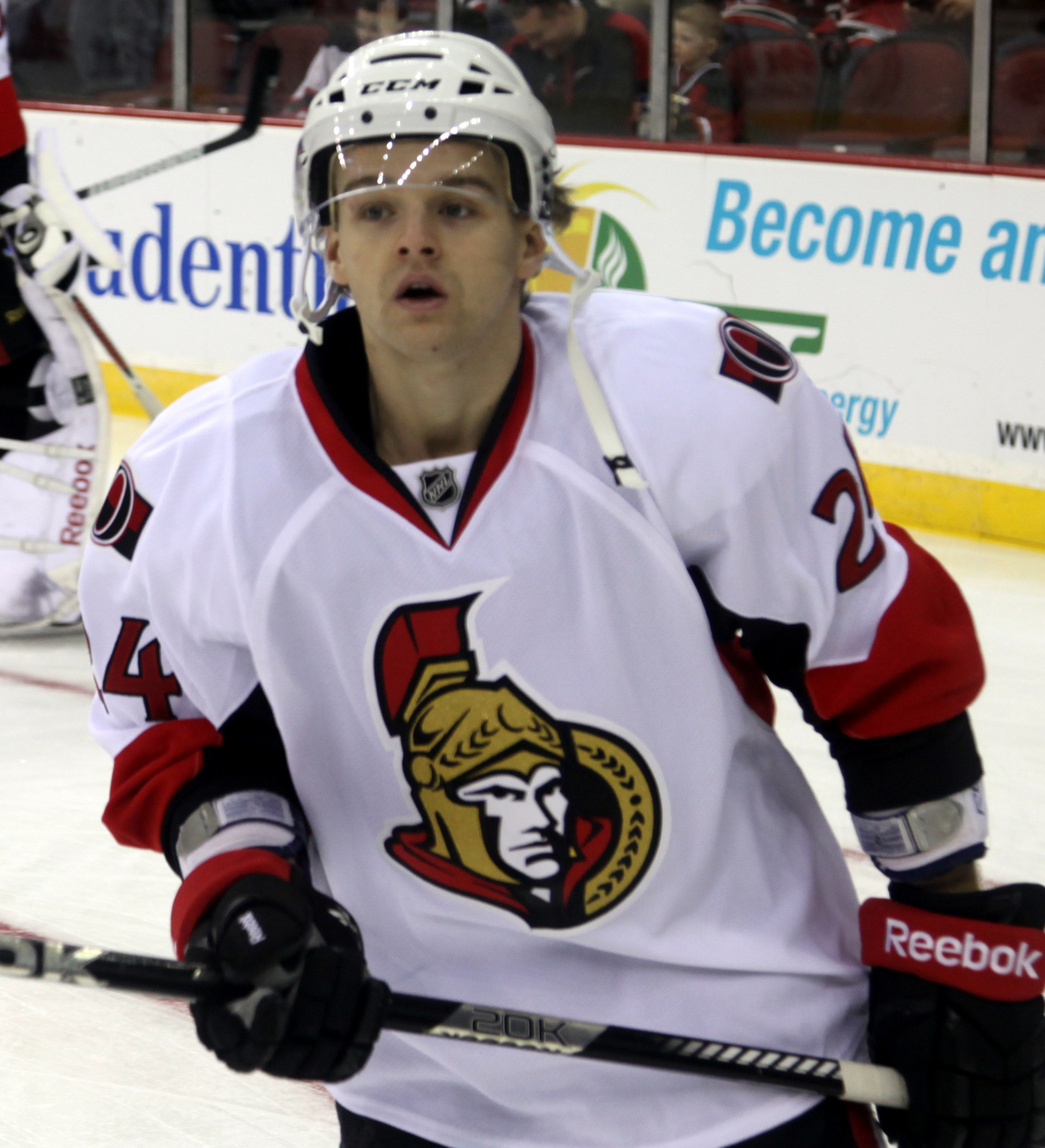 Da Costa in 2013.